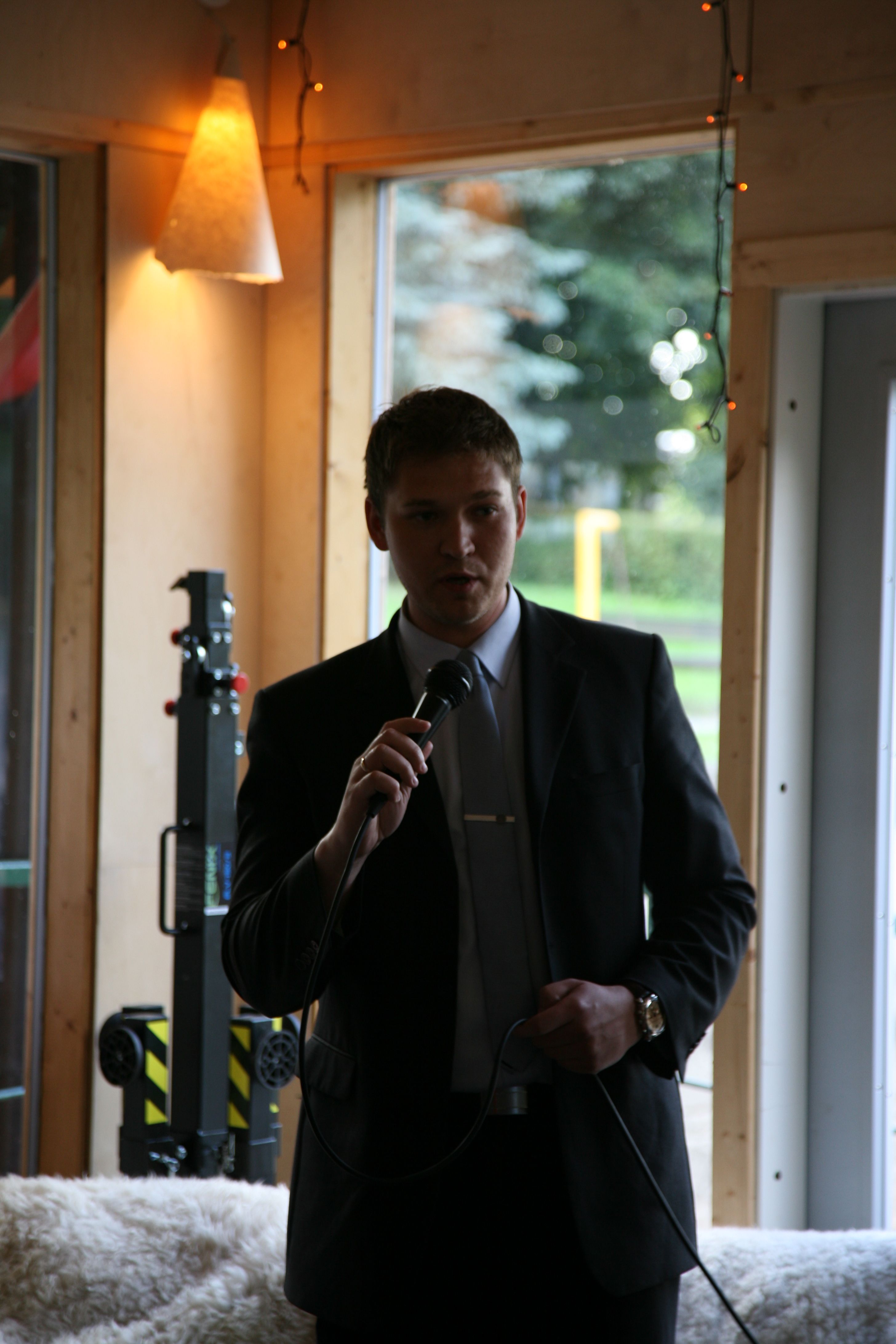 MAFUNi konverentsi õhtune vastuvõtt Tartus, 2015. Tartu abilinnapea Artjom Suvorov.